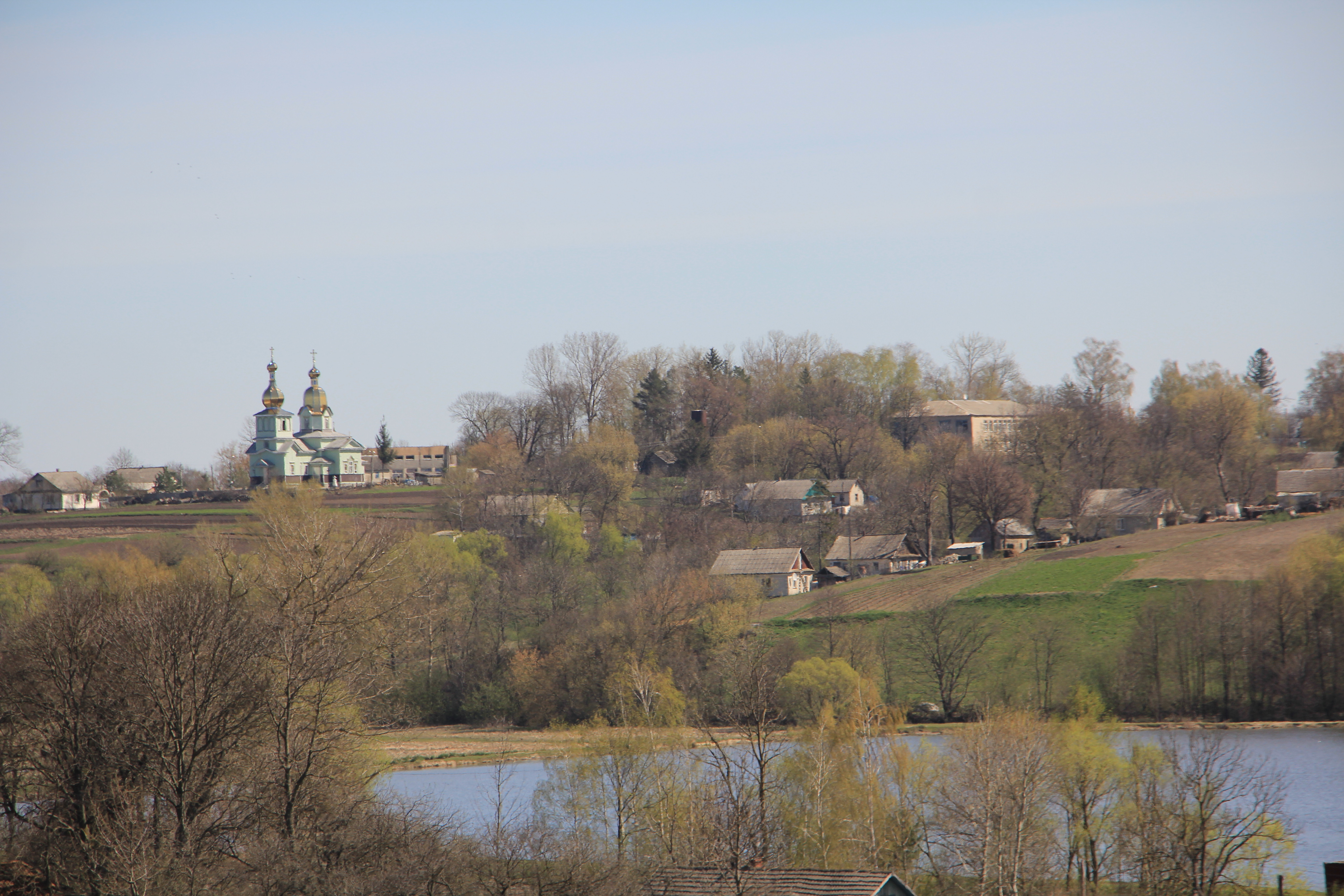 Село Передмірка Лановецького району Тернопільської області